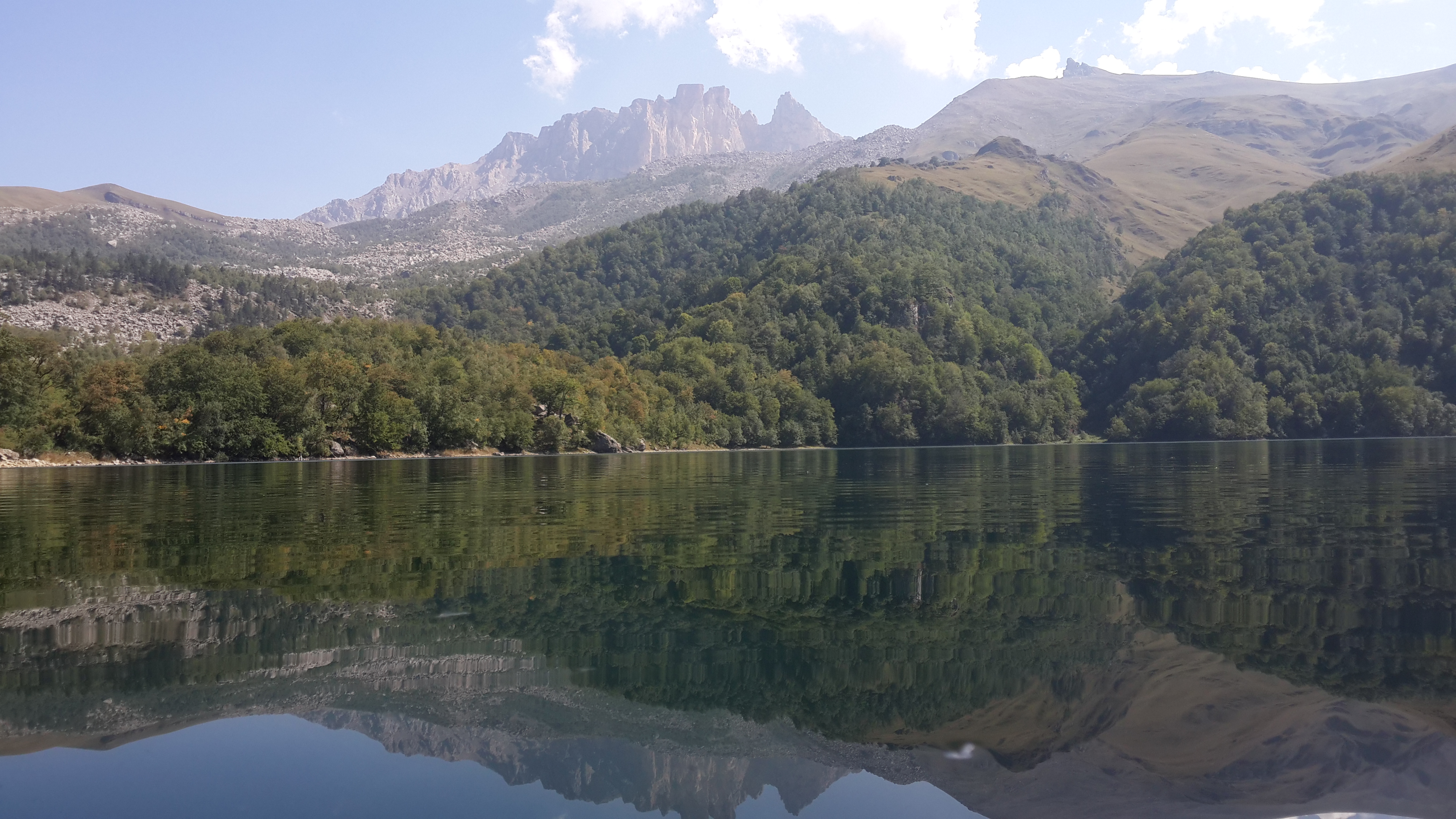 Maralgol lake in Azerbaijan. 3